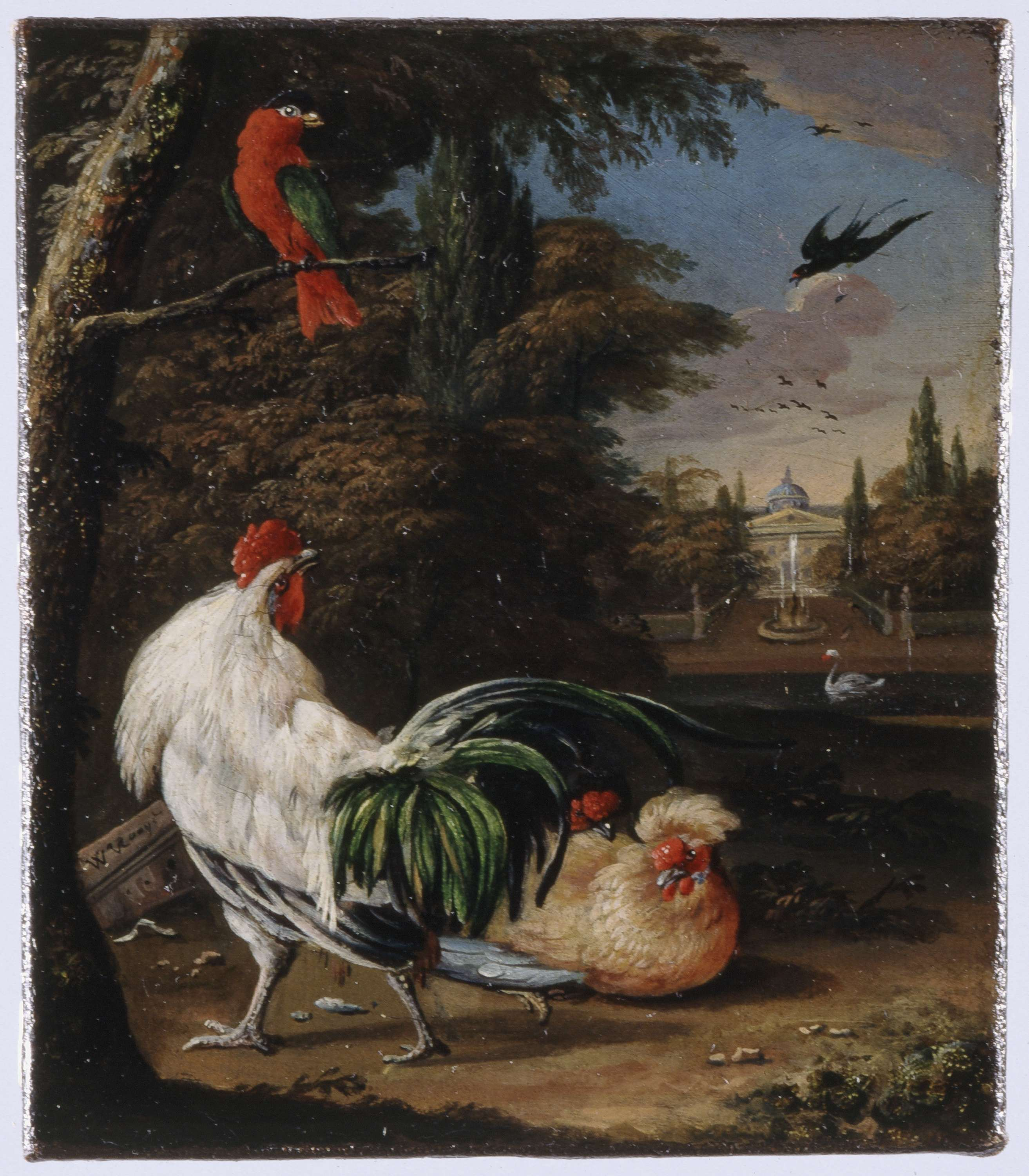 Schoorsteenstuk in de zaal van een poppenhuis; op de voorgrond drie sierhoenders en een roodgroene papegaai, in een parkachtige omgeving met rechts een vijver, fontein en uitzicht op een villa met koepeldak. Gesigneerd: W.v. Rooye. (Hendrik Wilhelmus); poppenhuisgoed; schoorsteenstuk